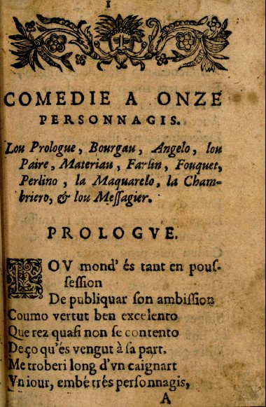 Edicioun de Brueis